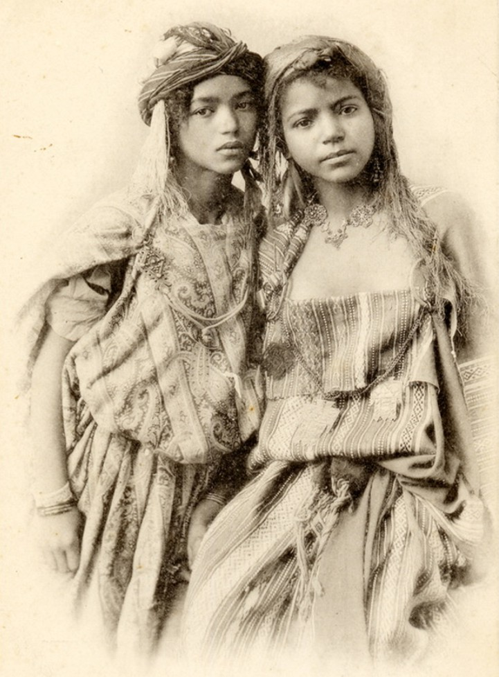 Femmes de Bou-Saada.